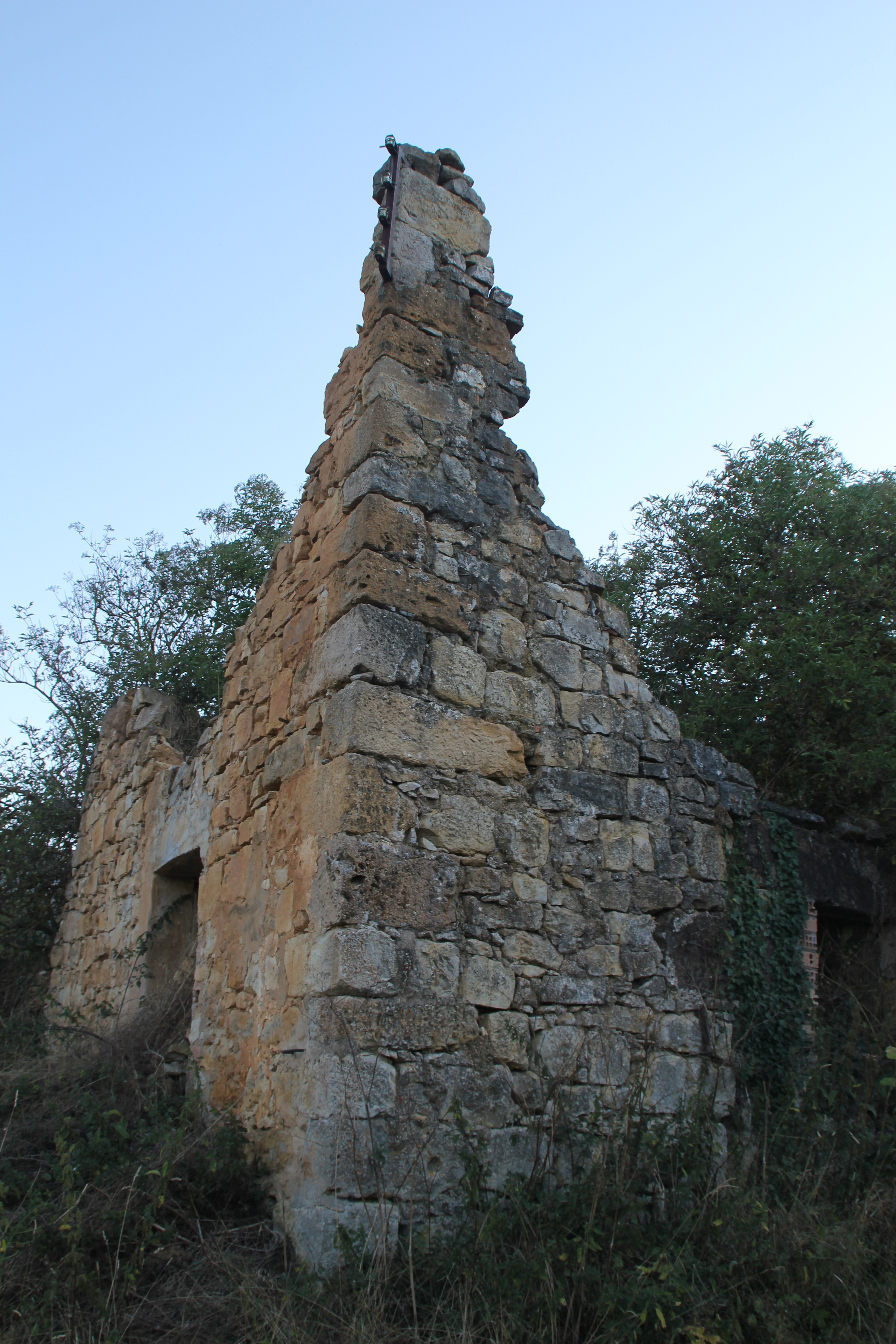 Casa en ruines de Villamardones